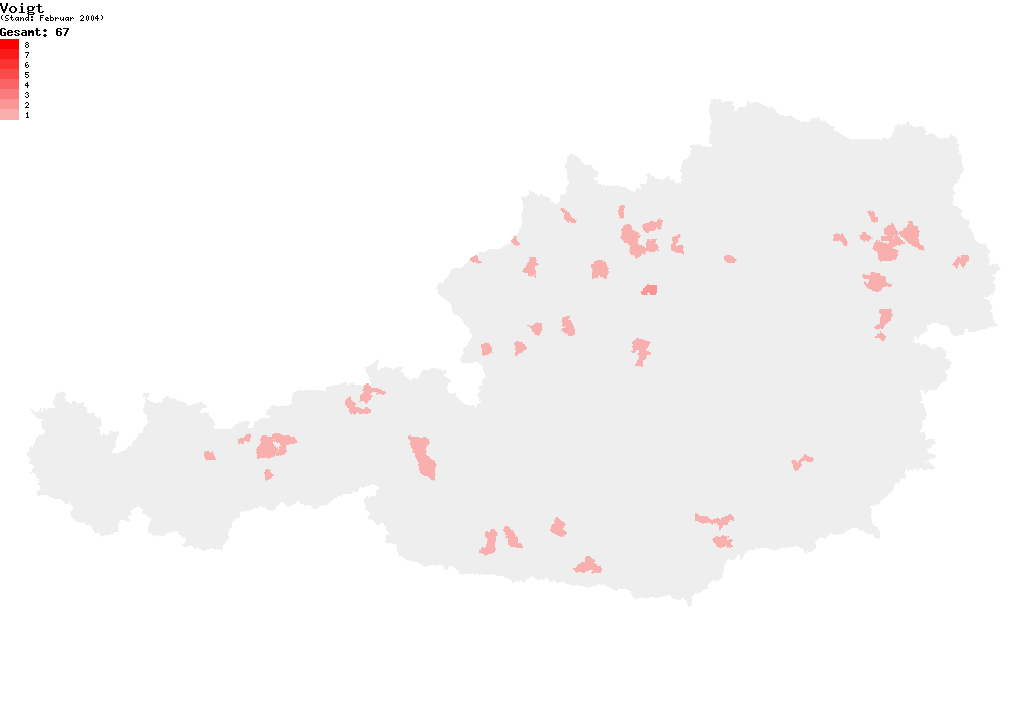 Verteilung des Nachnamens Voigt in Österreich nach dem Telefonbuch mit Stand vom Februar 2004